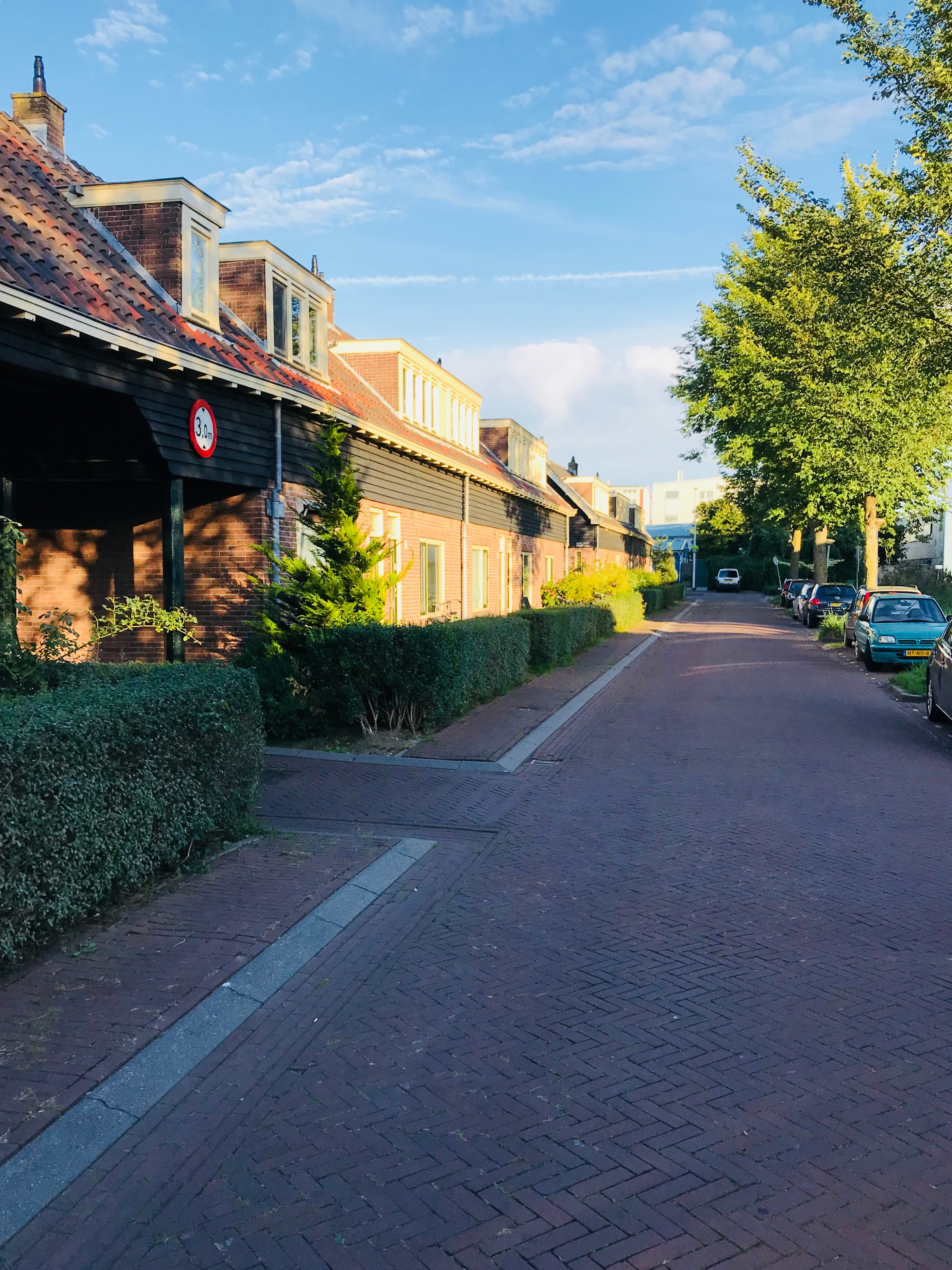 Vogelkade september 2018